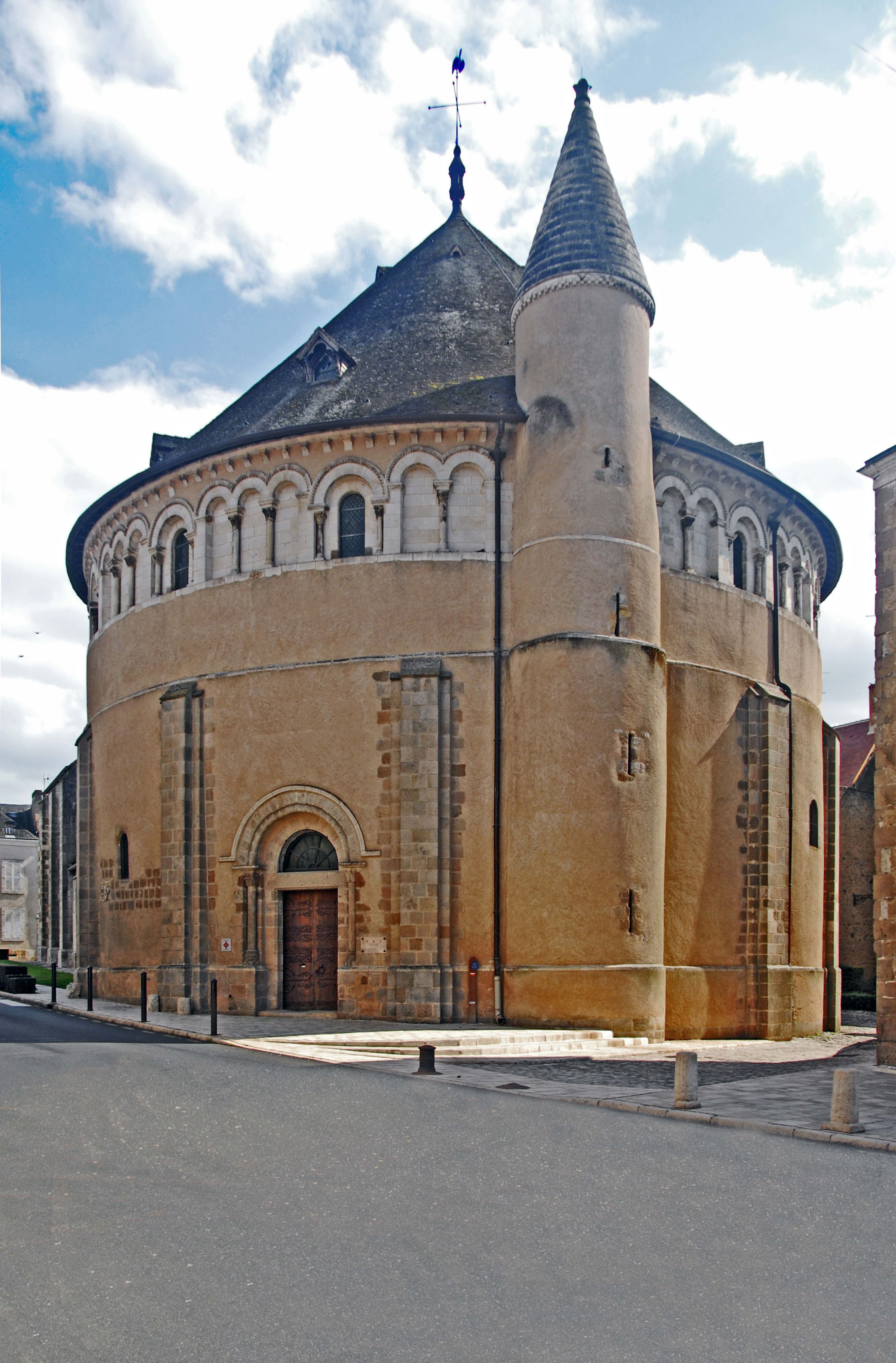 Neuvy_St.-Sépulcre, Rotunde von N